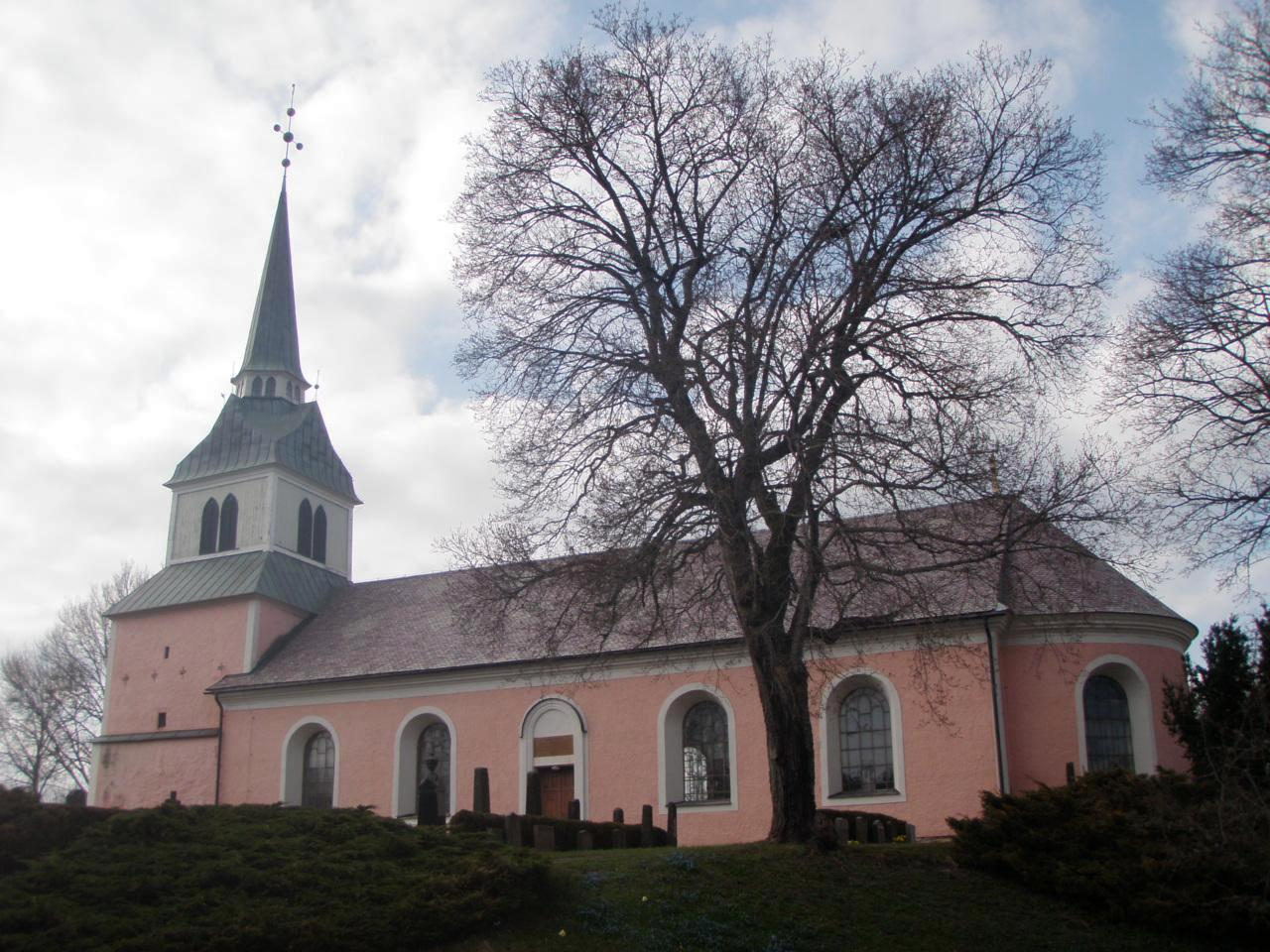 Östra Ny kyrka uppfördes sannolikt på 1200-talet, men har byggts till under århundradena, bland annat tillkom tornet 1784 och kyrkan byggdes om till sin nuvarande stil 1821 - 1822. Socknen kallades ursprungligen "Nysokn" och namnet antyder att den är något yngre än de västerut belägna Vikbolandskyrkorna.